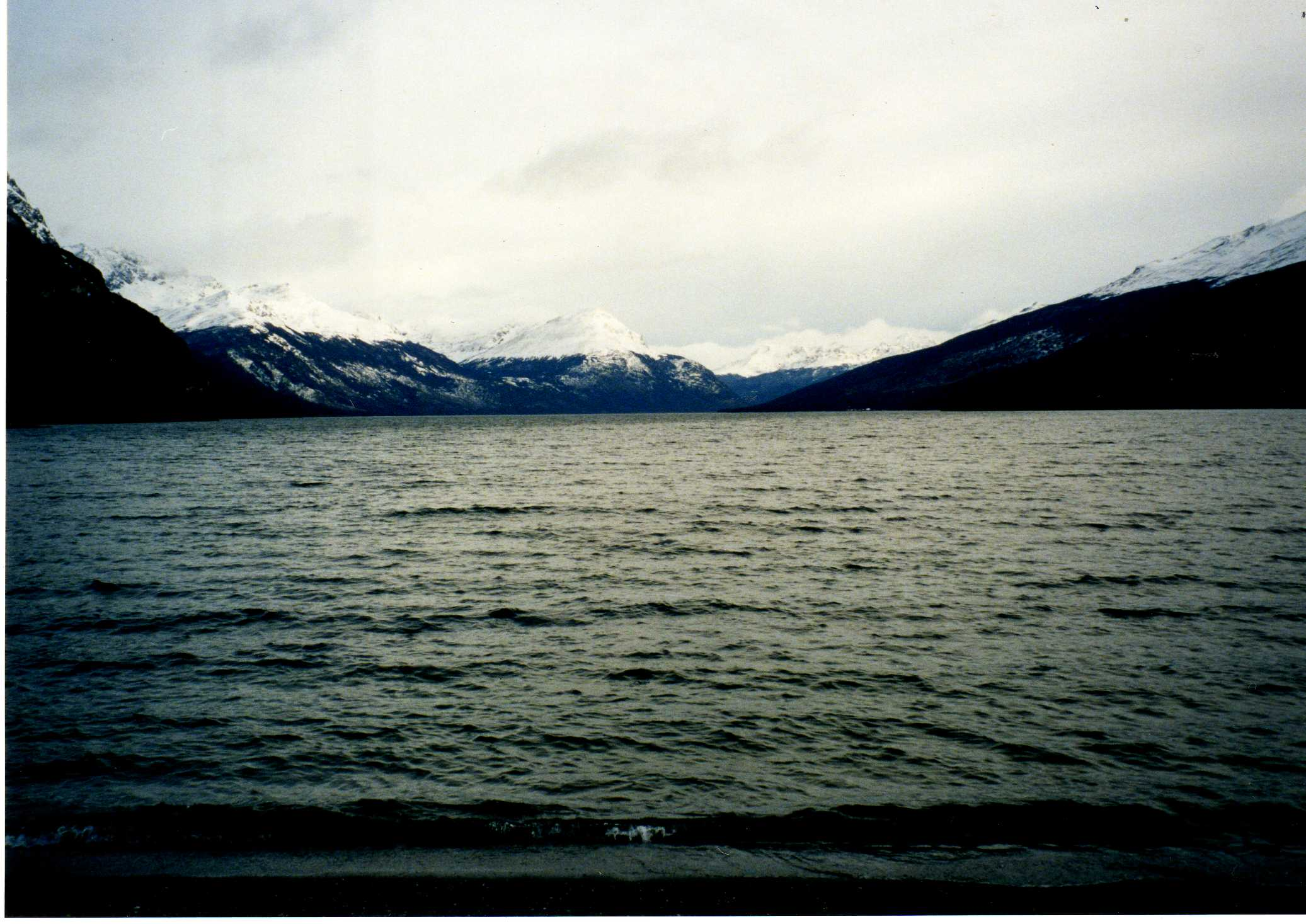 Lago Roca, en Ushuaia, Argentina.